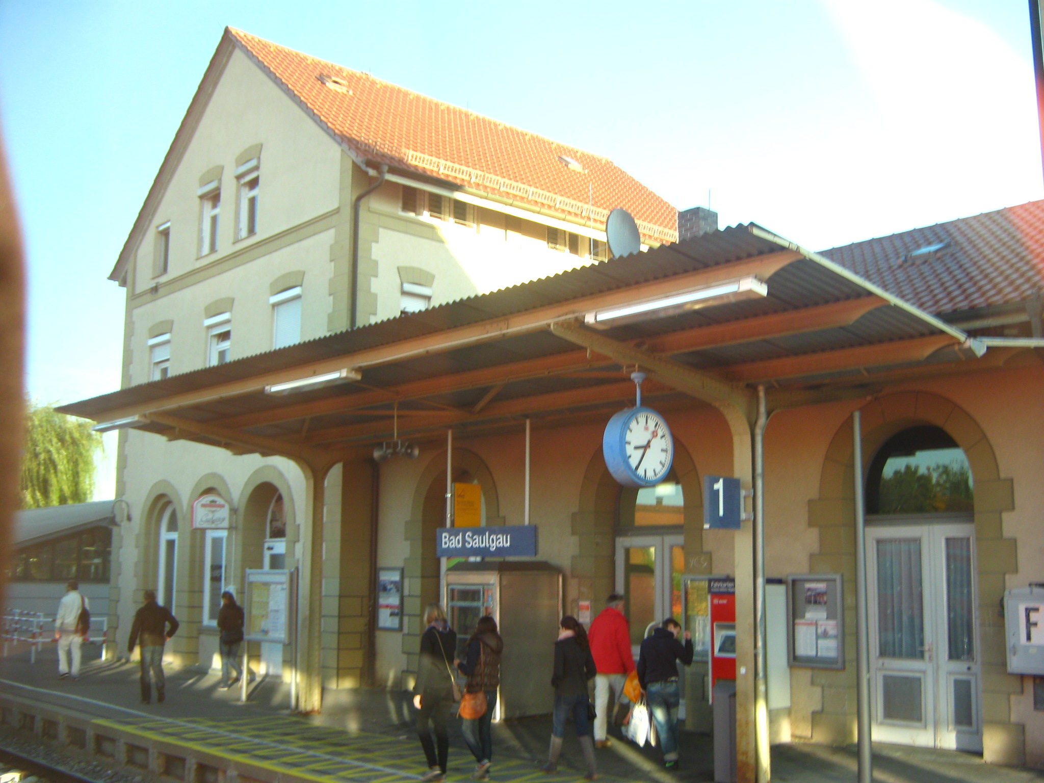 Der Bahnhof Bad Saulgau liegt in Bad Saulgau an der Bahnstrecke der Zollernalbbahn zwischen Sigmaringen und Aulendorf im Abschnitt der Bahnstrecke Herbertingen–Aulendorf